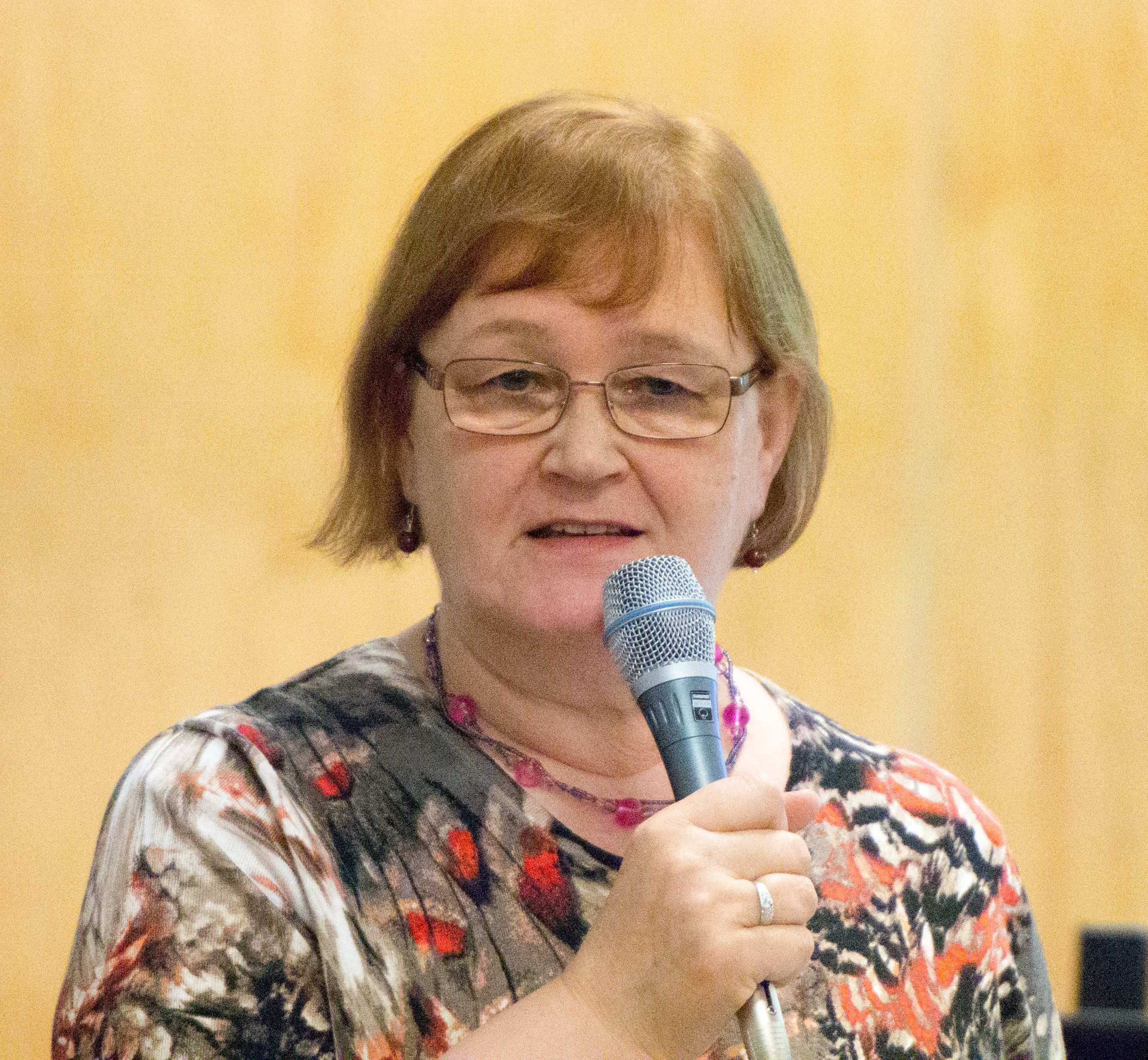 Anna-liisa valtavaara suomalainen kirjailija